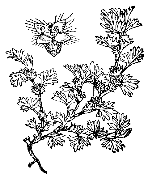 Slika 195. Njivska hribja resa. (Alchemílla arvénsis.)